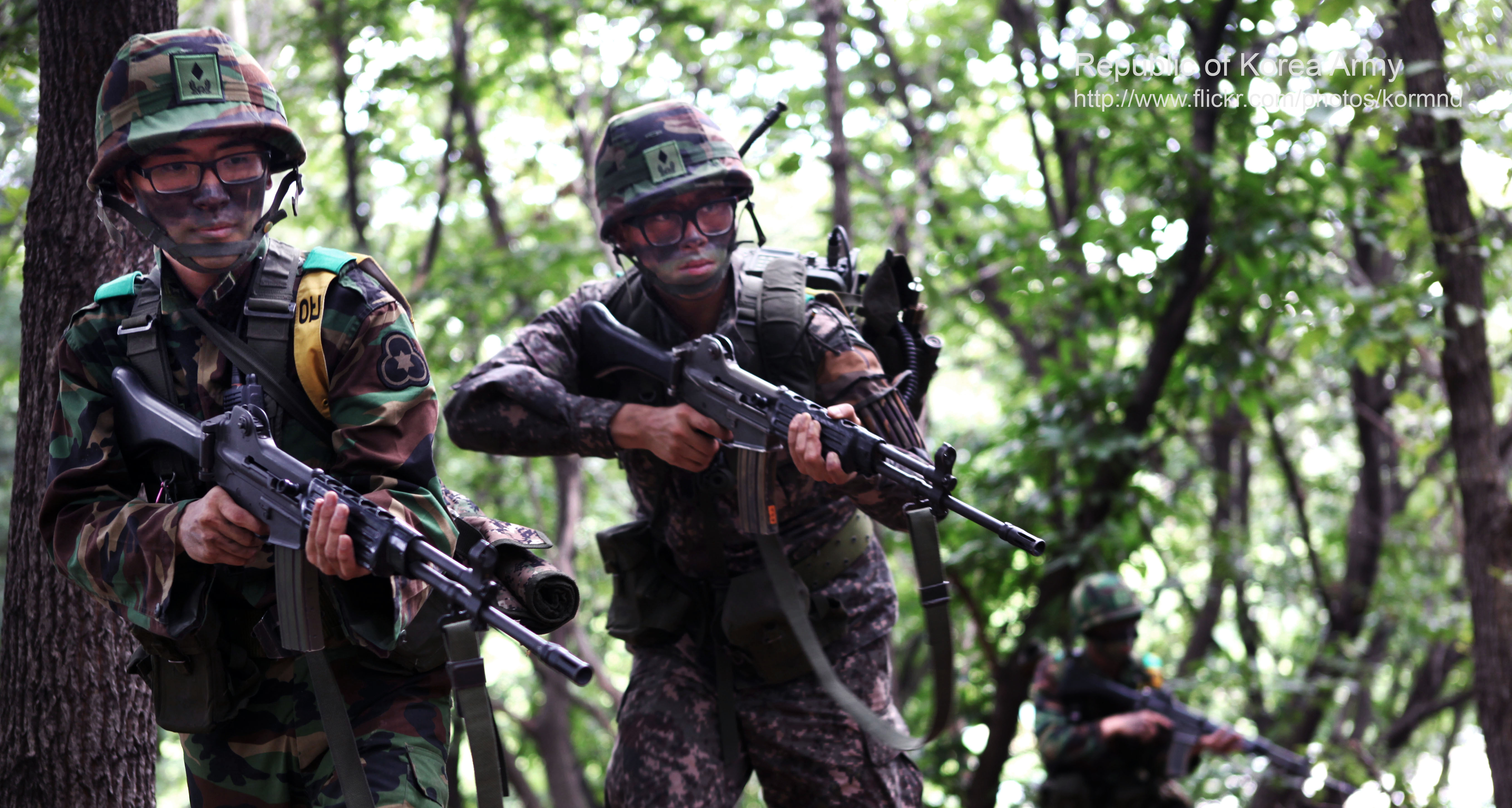 육군 36사단 초임장교들이 '국지도발 임무구행 경연대회' 중 국지도발 상황에 대한 작전을 펼치고 있다.